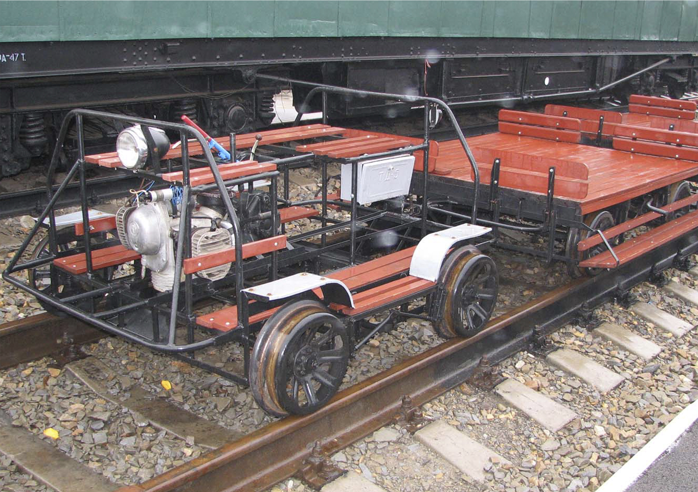 Дрезина построена Приокским машиностроительным заводом в 1954 году